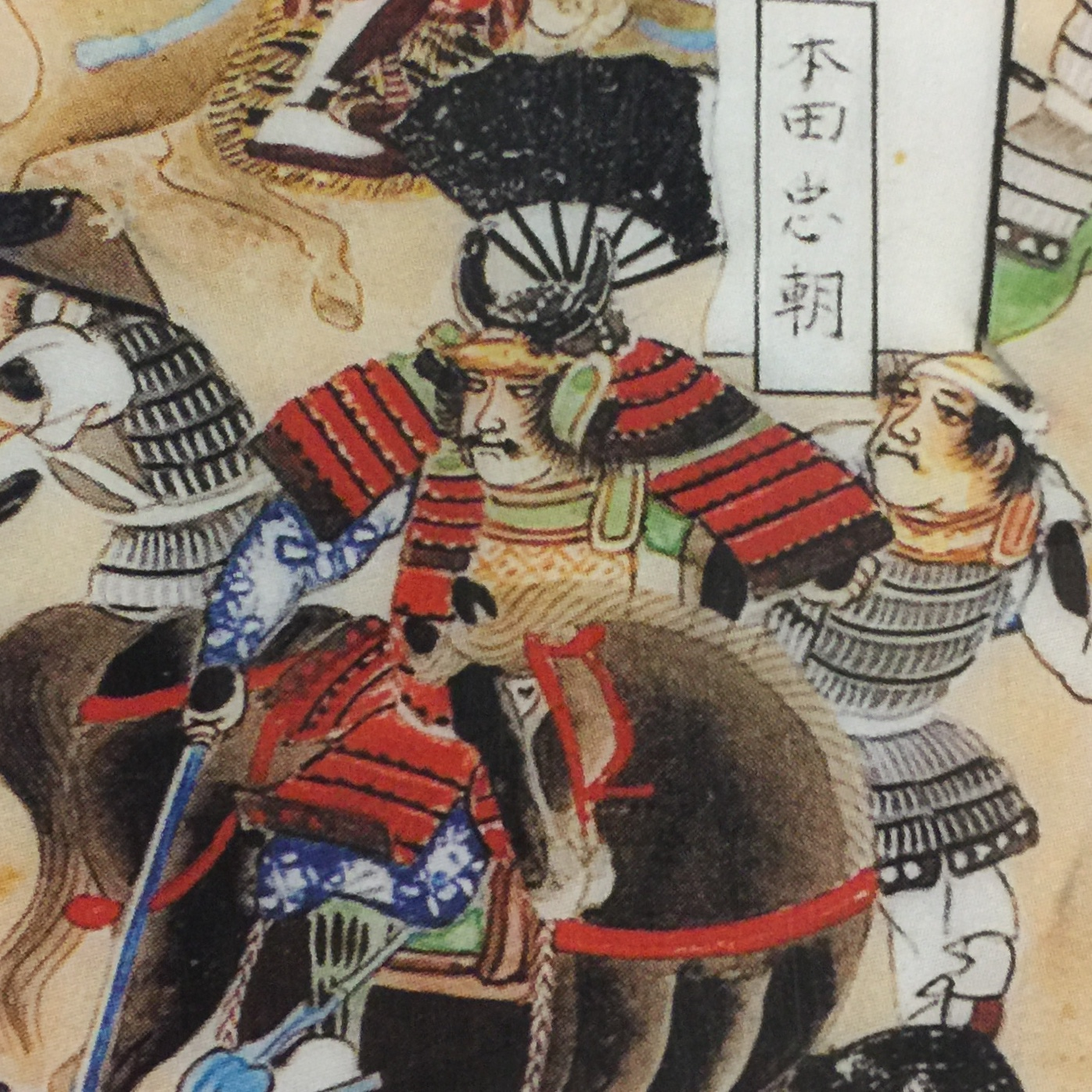 関ヶ原合戦図屏風（関ケ原町歴史民俗資料館本）に描かれた、徳川家家臣の本多忠朝。